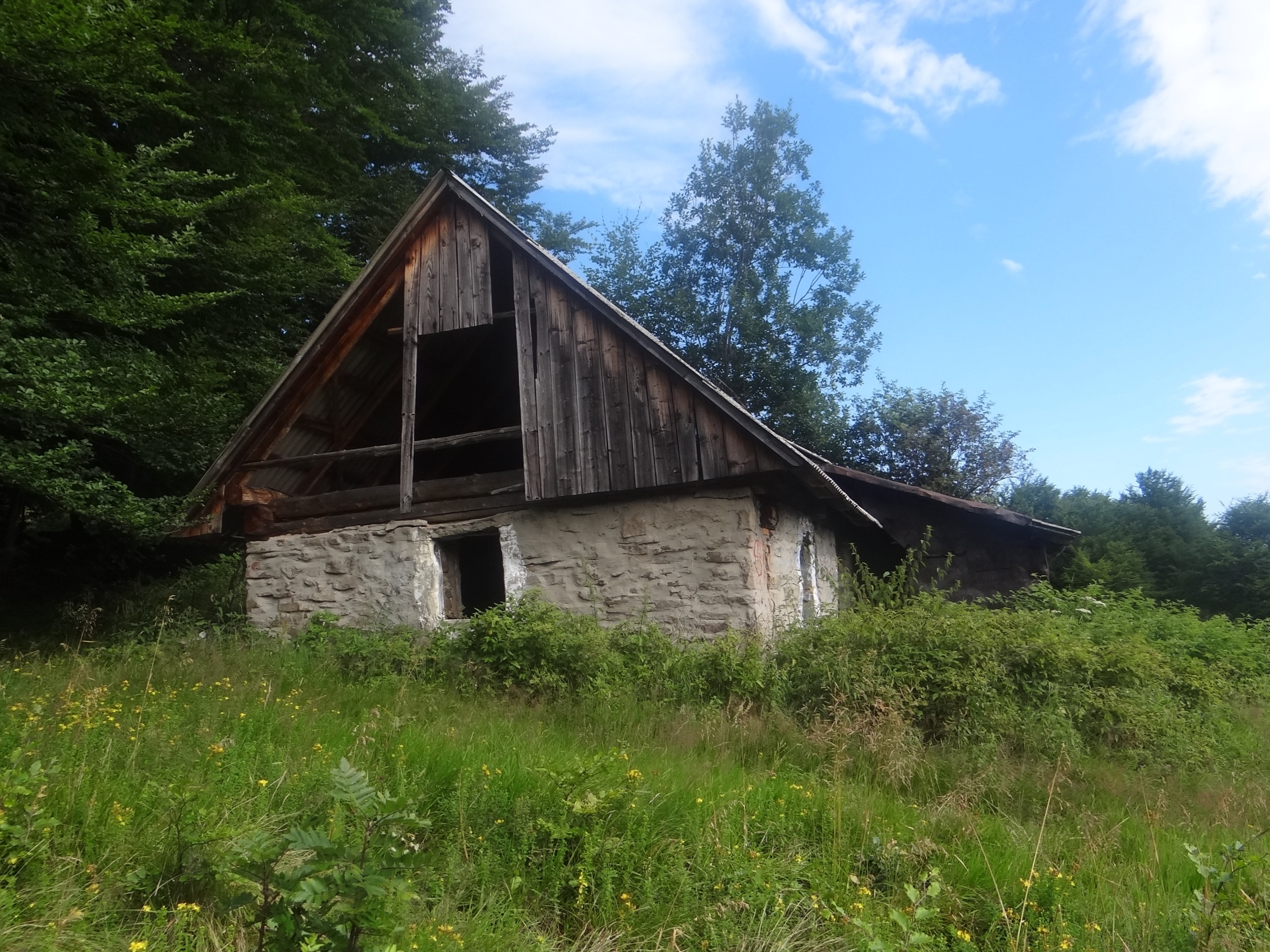 Murowany, opuszczony już szałas na Hali Uszczawne